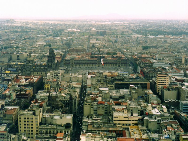 Mexiko Stadt (Luftaufnahme)